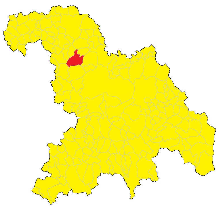 Mappa del comune di Lu-Cuccaro (AL)